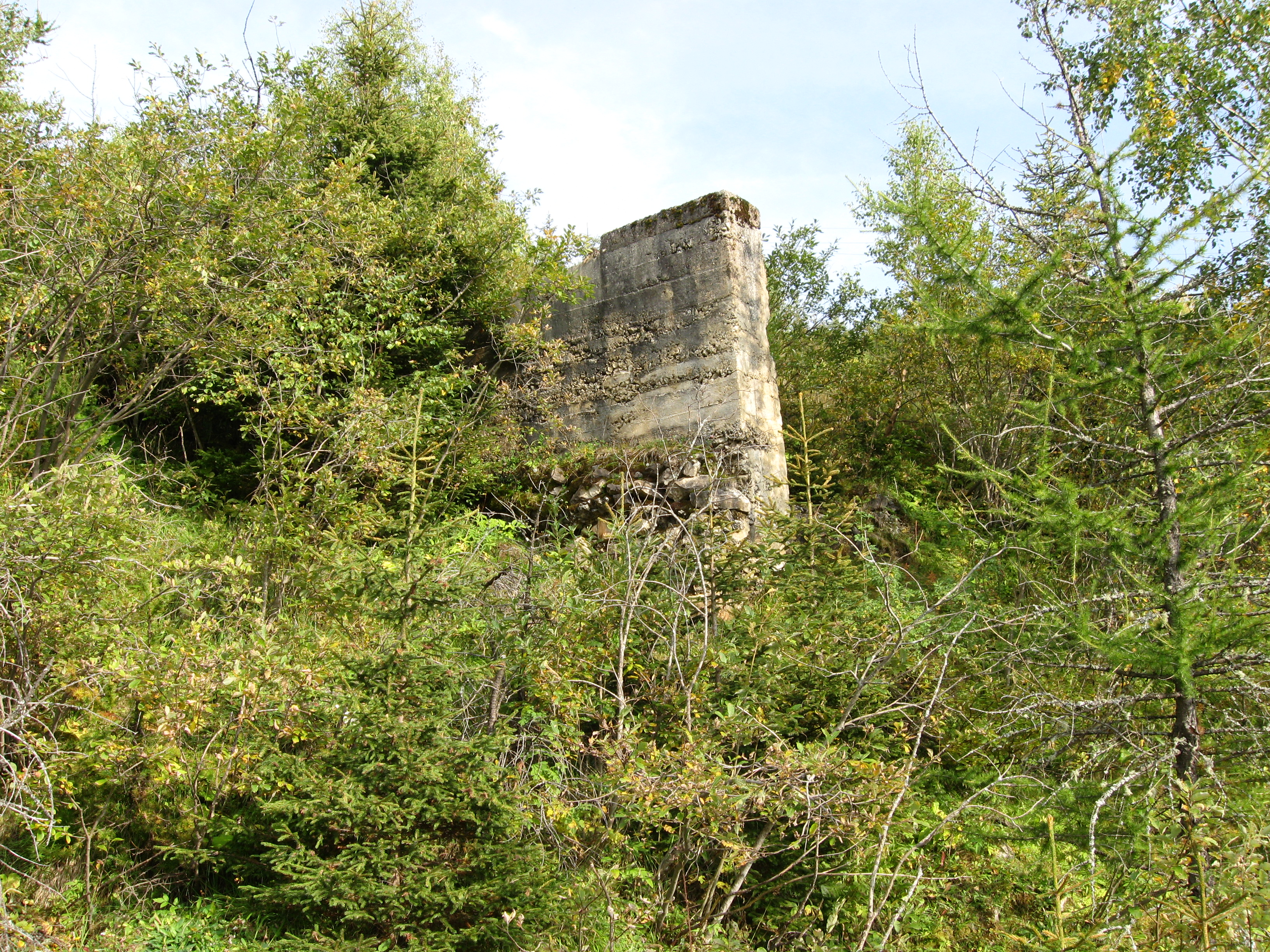 Eines der wenigen baulichen Überreste des aufgelassenen Magnesitbergwerkes Tux